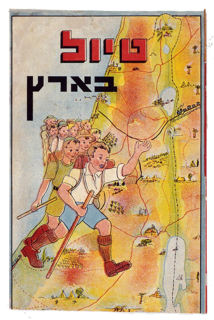 טיול בארץ, שנות הארבעים, תוית אריזה, משחק